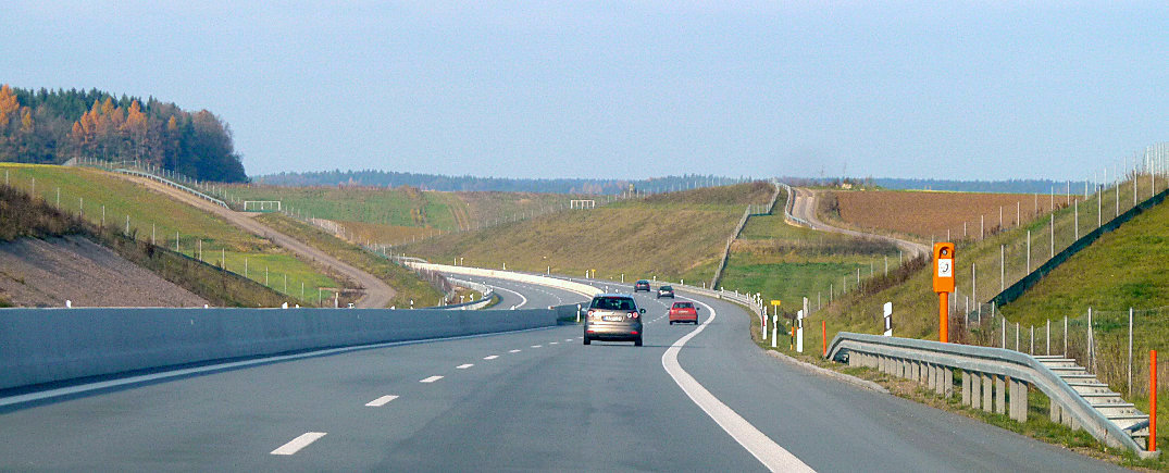 B15 neu in Fahrtrichtung Regensburg - Höhe nördliches Ergoldsbach